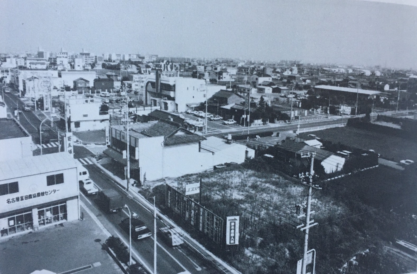 名古屋市合併当時の富田支所周辺の様子